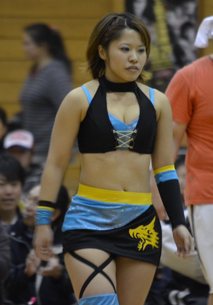 大畠 美咲